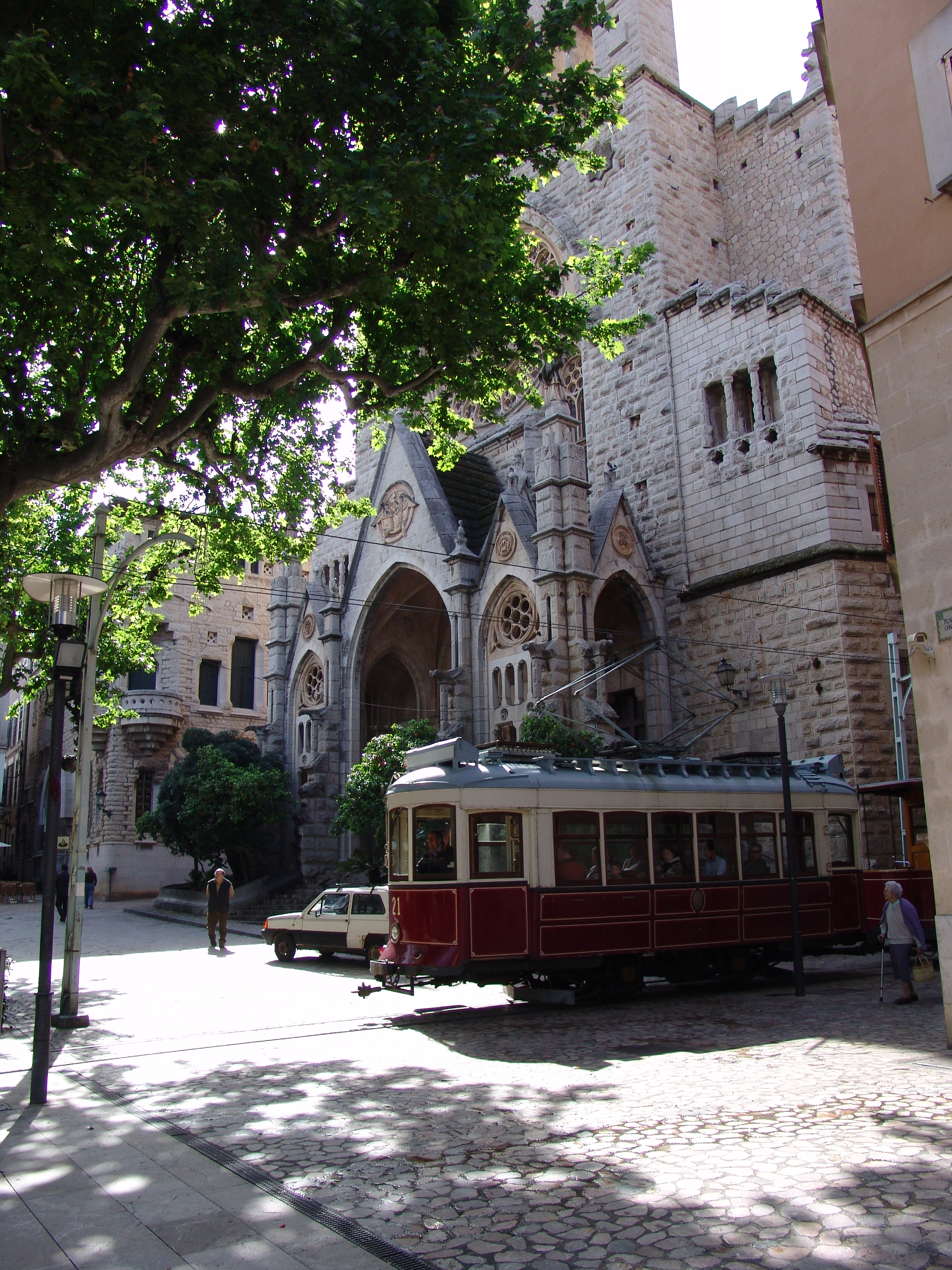 Über den Marktplatz von Sóller fährt die historische Straßenbahn